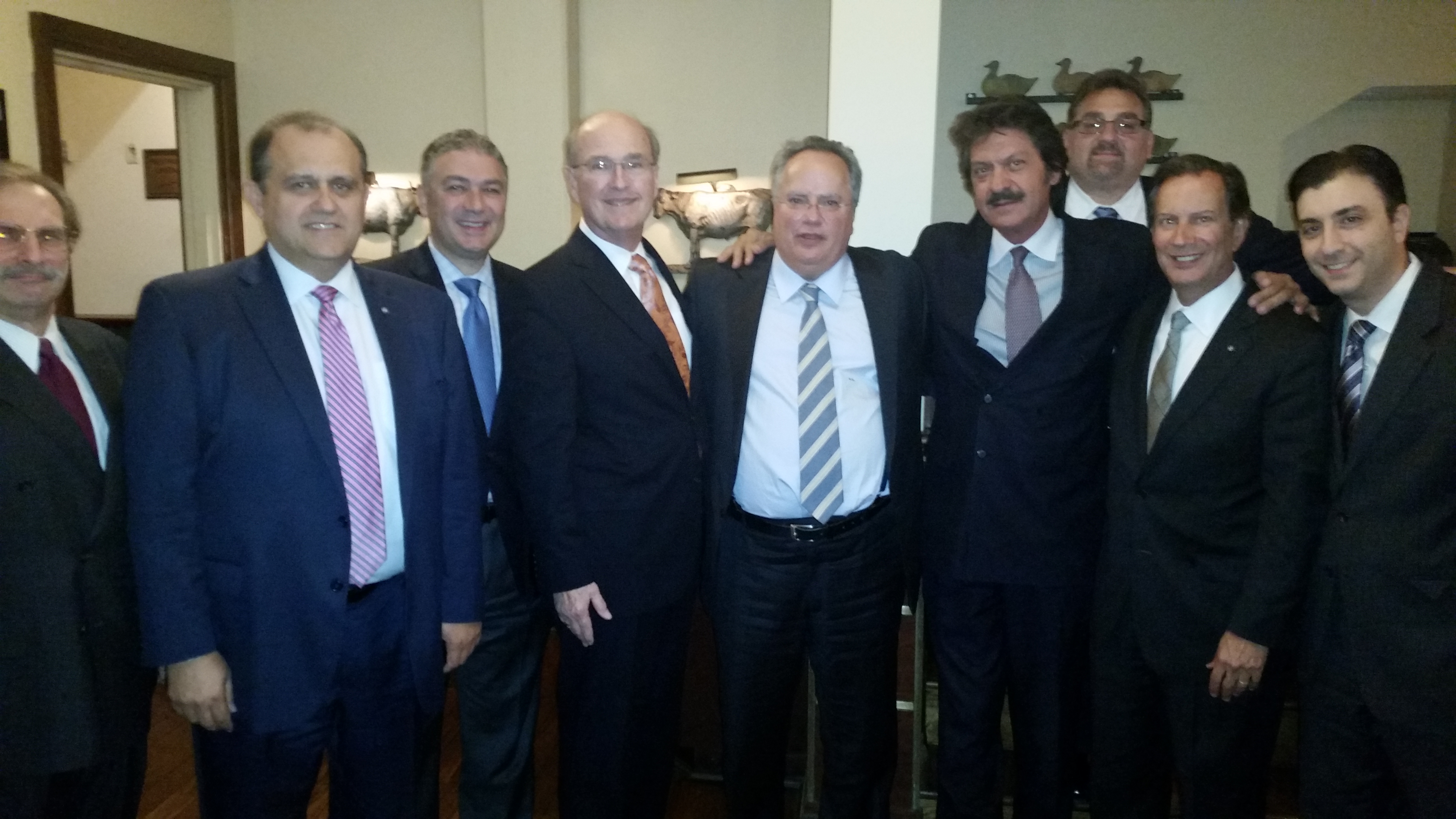 Δείπνο που παρατέθηκε προς τιμήν του ΥΠΕΞ Ν. Κοτζιά από τους εκπροσώπους των ομογενειακών οργανώσεων A.H.I., AHEPA και την Coordinated Effort for Hellenes (Ουάσιγκτων, 21.04.15)